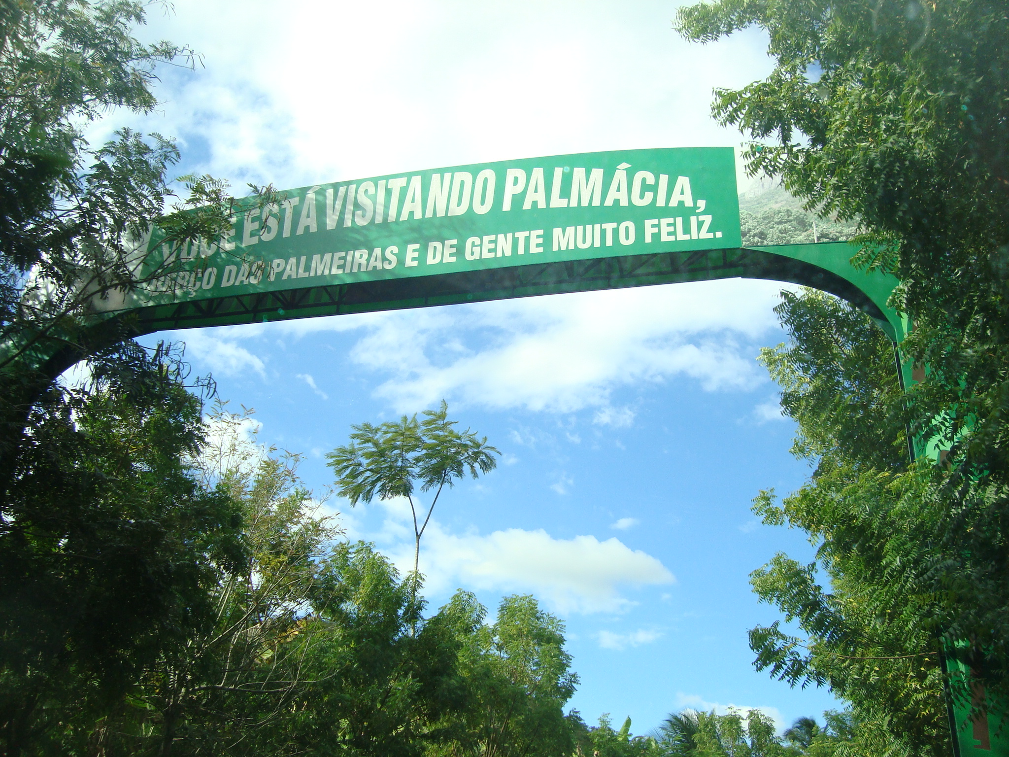 Pórtico de Entrada de Palmácia